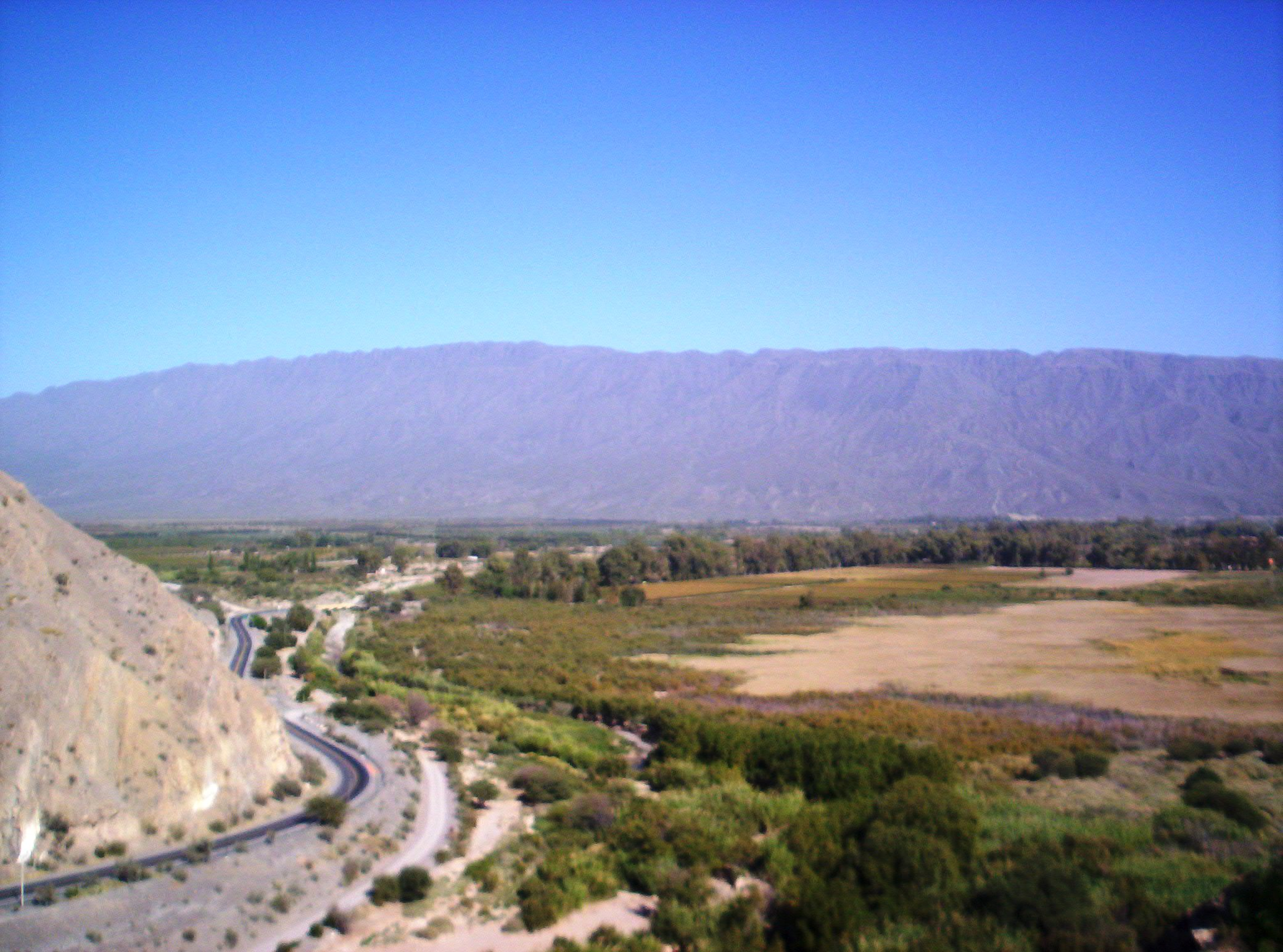 El Valle de Zonda junto a la reserva Sarmiento, departamento Zonda, Argentina